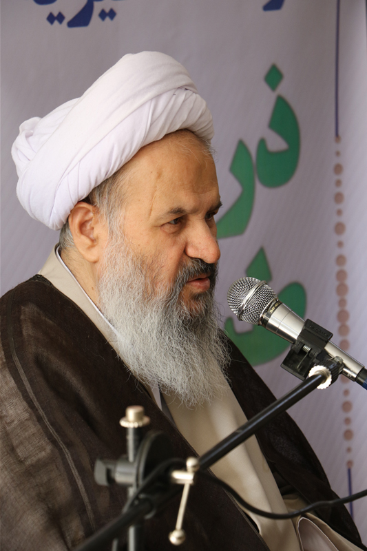 عبدالنبی نمازی